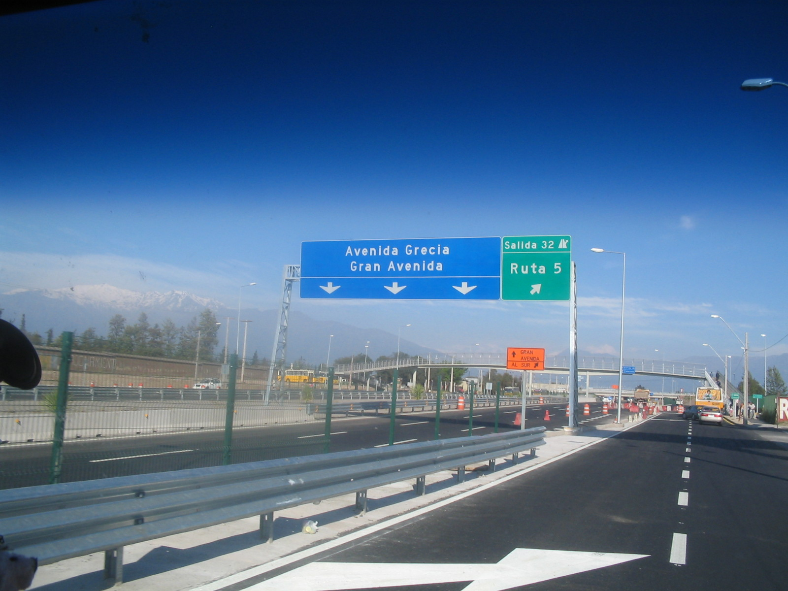 Autopista Vespucio Sur antes de llegar a Ruta 5 taken by Emilio Sepúlveda (DJ Funkin'mixer)